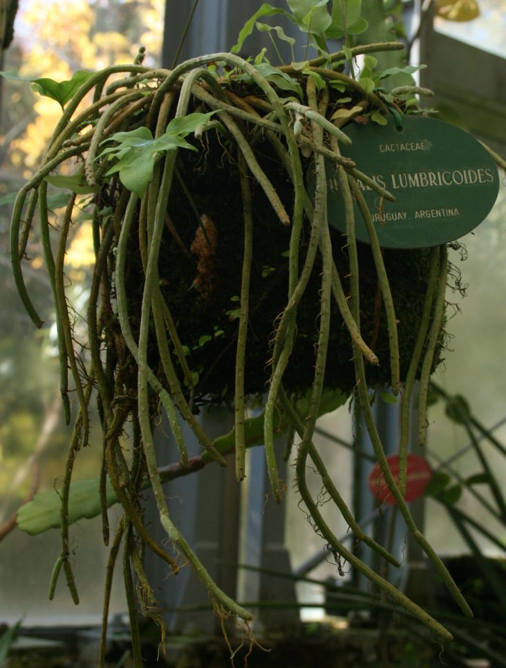 Lepismium lumbricoides (Argentína) a madridi Real Jardín Botanico gyűjteményében